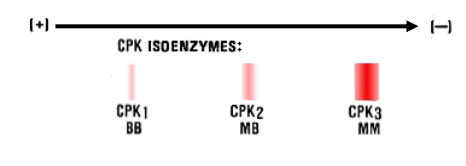 نظائر إنزيم كينار كرياتين